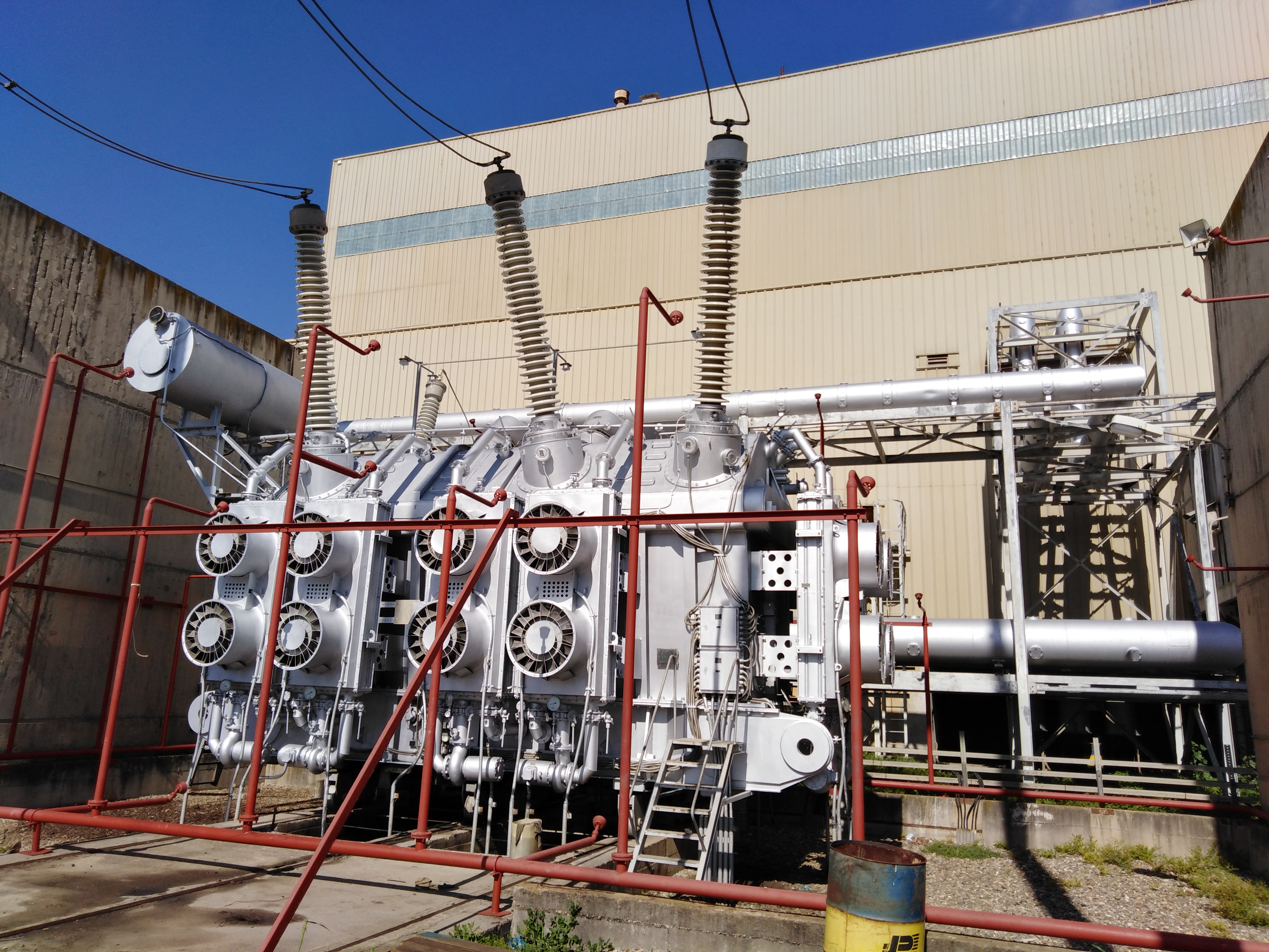 Алжир. ТЕС Джиджель. 3 блок. Головний трансформатор 3КЕ. ТДЦ-250000/220Т1. 250000кВА. Запоріжтрансформатор. 1989. Заводський №140238